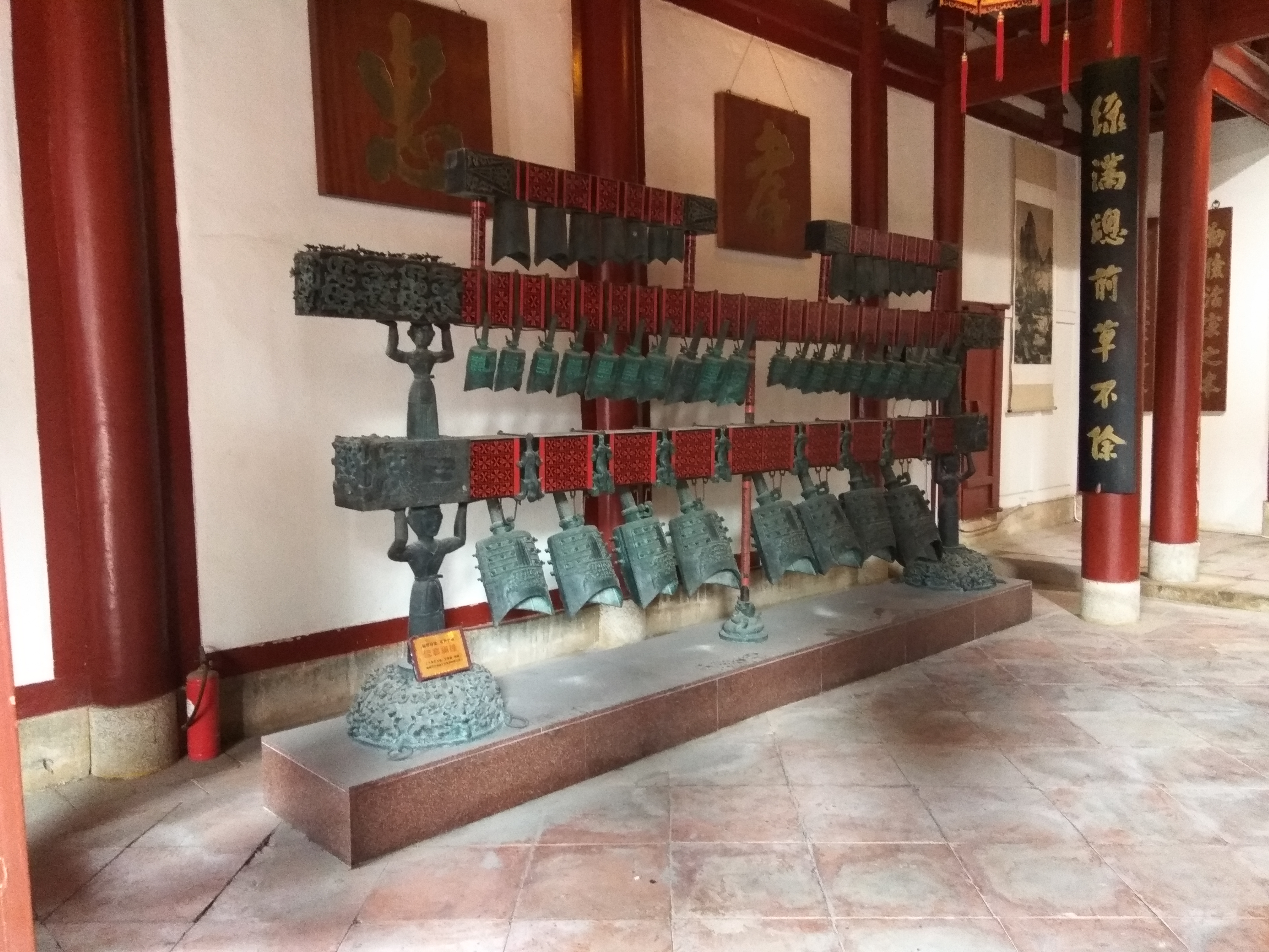 自己拍摄